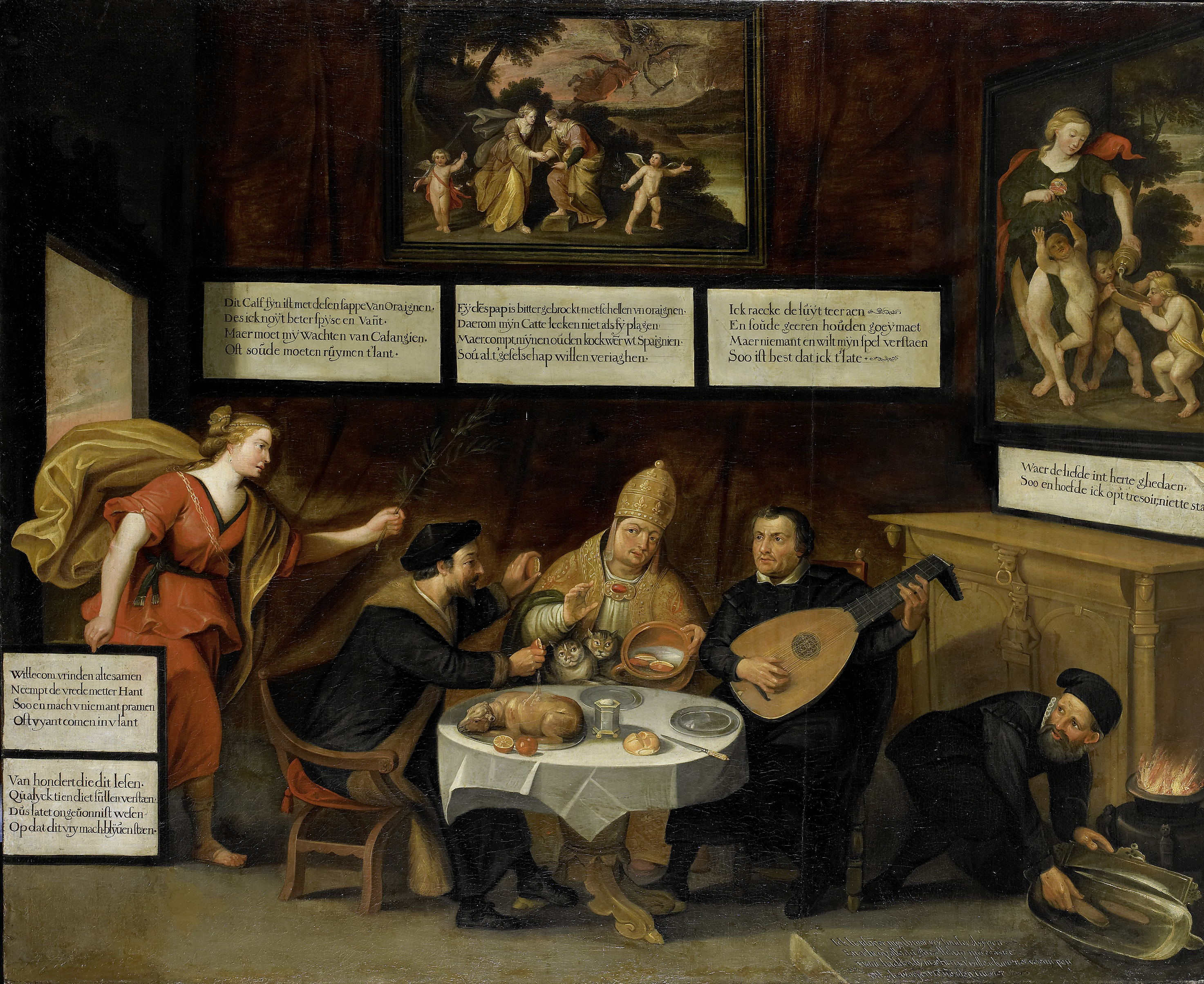 De Vrede maant de kerken tot verdraagzaamheid. In een interieur zitten Calvijn (bij een gebraden kalf). De paus (met een kom pap en twee katten op schoot) en Martin Luther (spelend op een luit) zitten aan tafel te twisten. Rechts doopt de wederdoper zijn brood in de dekschaal bij de haard. Links staat de vrouwelijke personificatie van Vrede met een olijftak in de hand. Aan de muur twee schilderijen. Rechts boven het dressoir Liefde (Caritas) met haar kinderen; op de achterwand wordt Vrede door Rechtvaardigheid op een voetstuk gezet terwijl Razernij wordt verdreven.